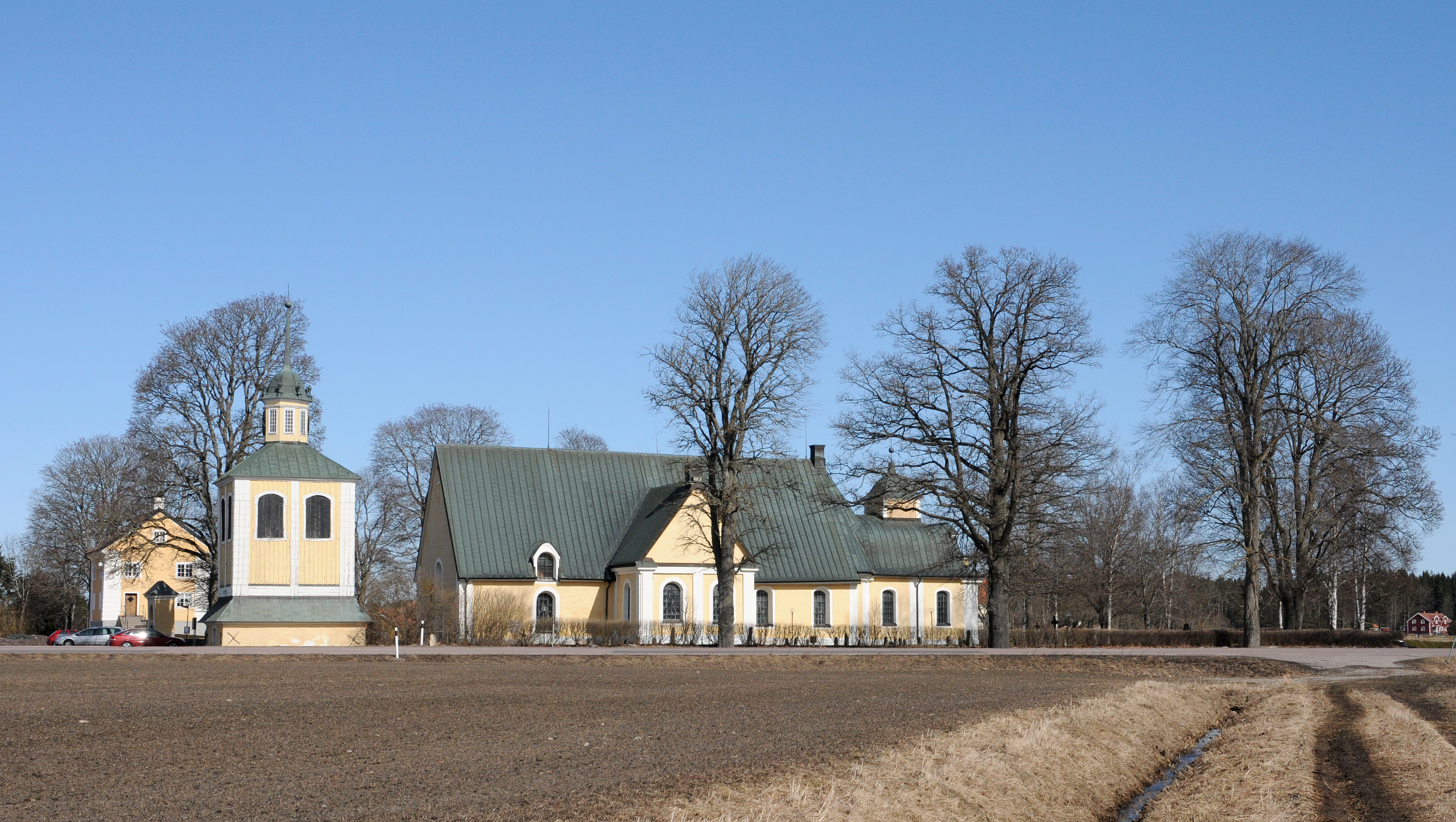 Stora Malms kyrka i Katrineholms kommun